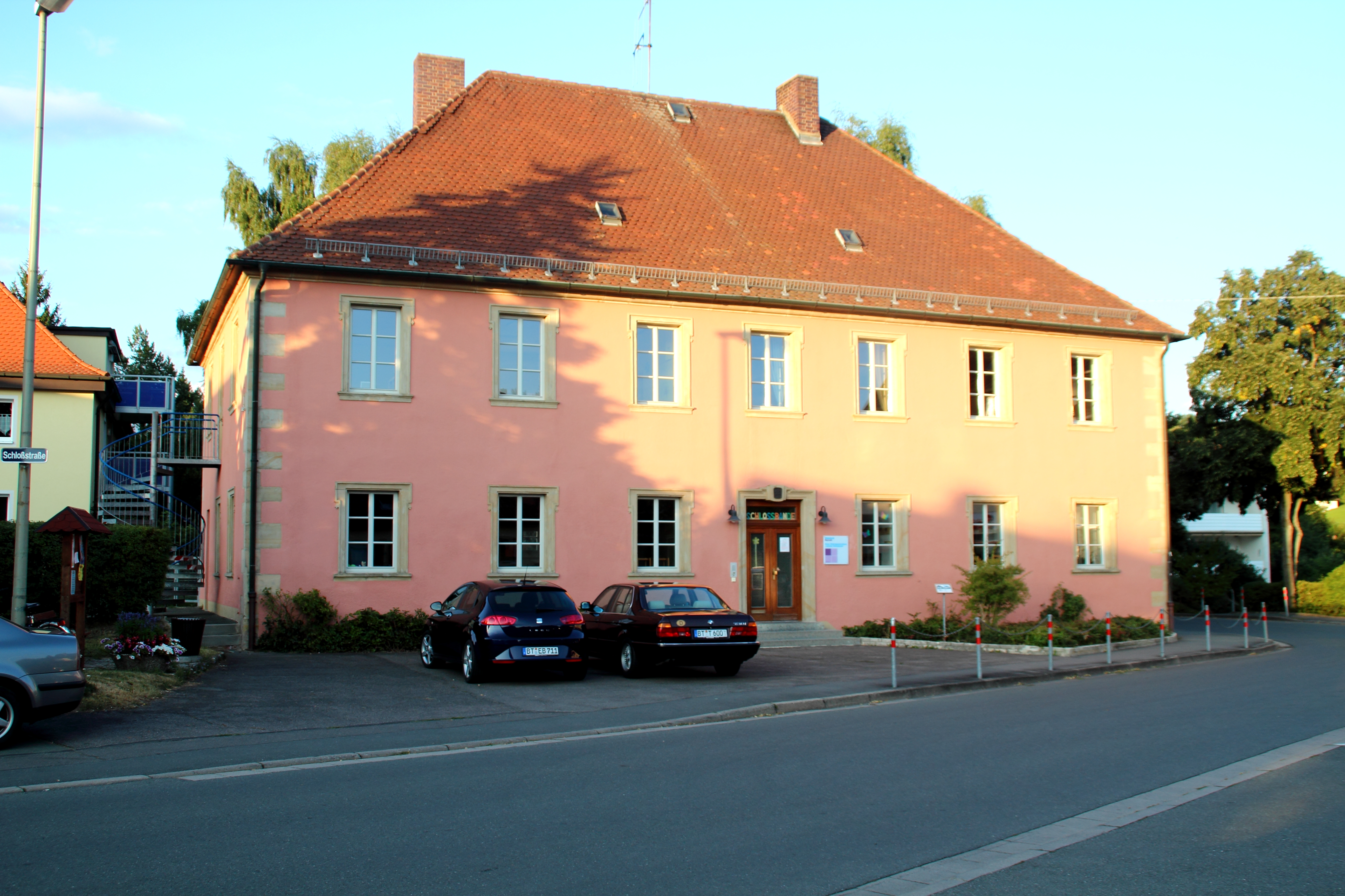 Schloss Laineck (Bayreuth) heute Kindergarten